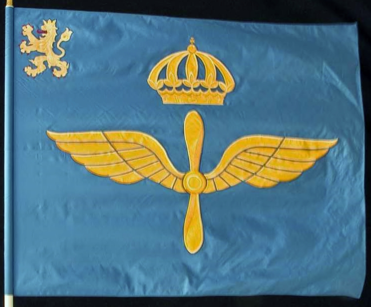 Göta flygflottiljs fana, överlämnad den 13 november 1941 på Sävebasen av HKH Kronprinsen Gustaf Adolf. Fanan överlämnad till Skaraborgs flygflottilj (F 7) år 1969. Återlämnad år 2008 till Armémuseum.